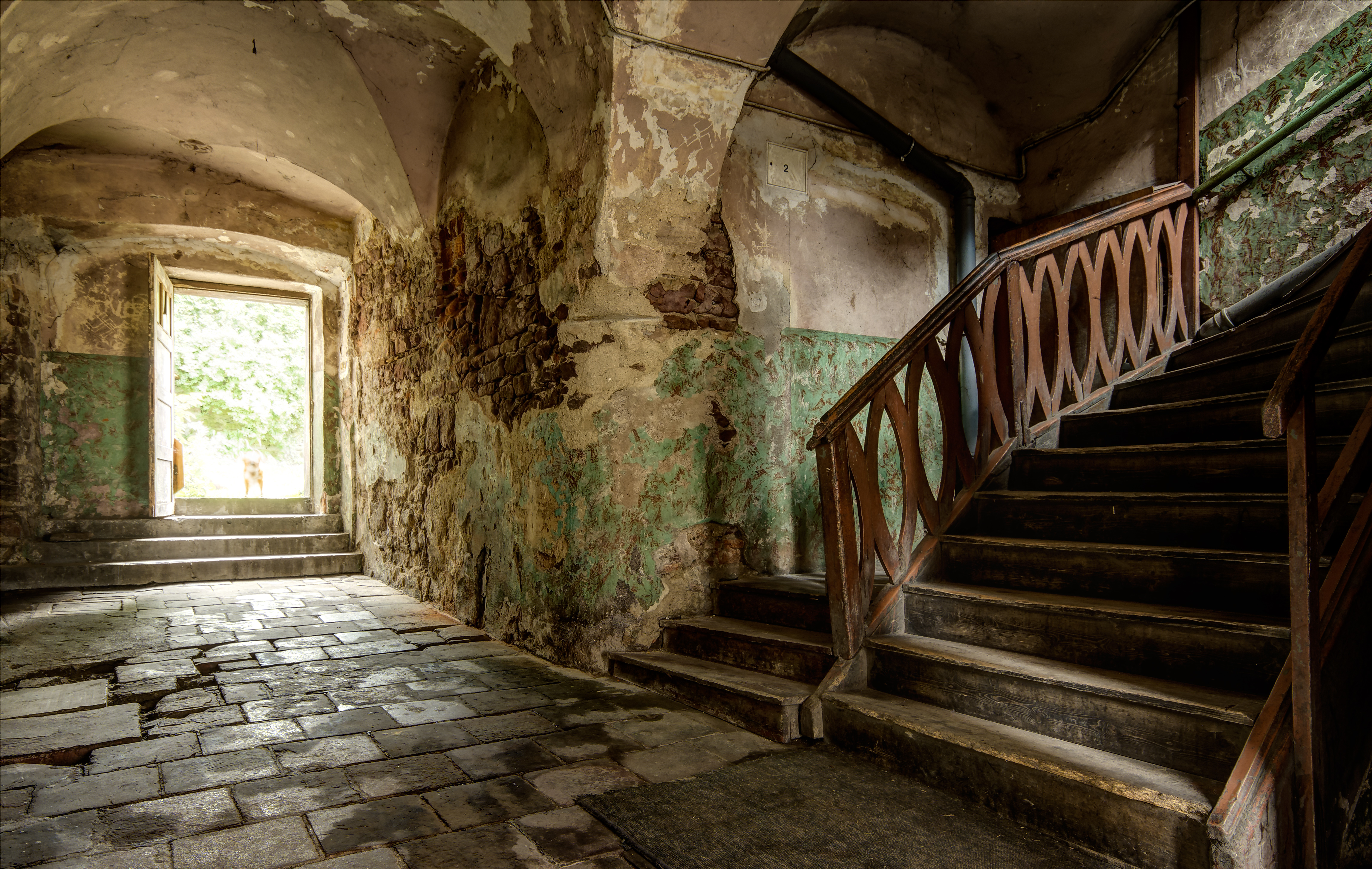 Nowa Ruda, dom ul. Kościelna 12